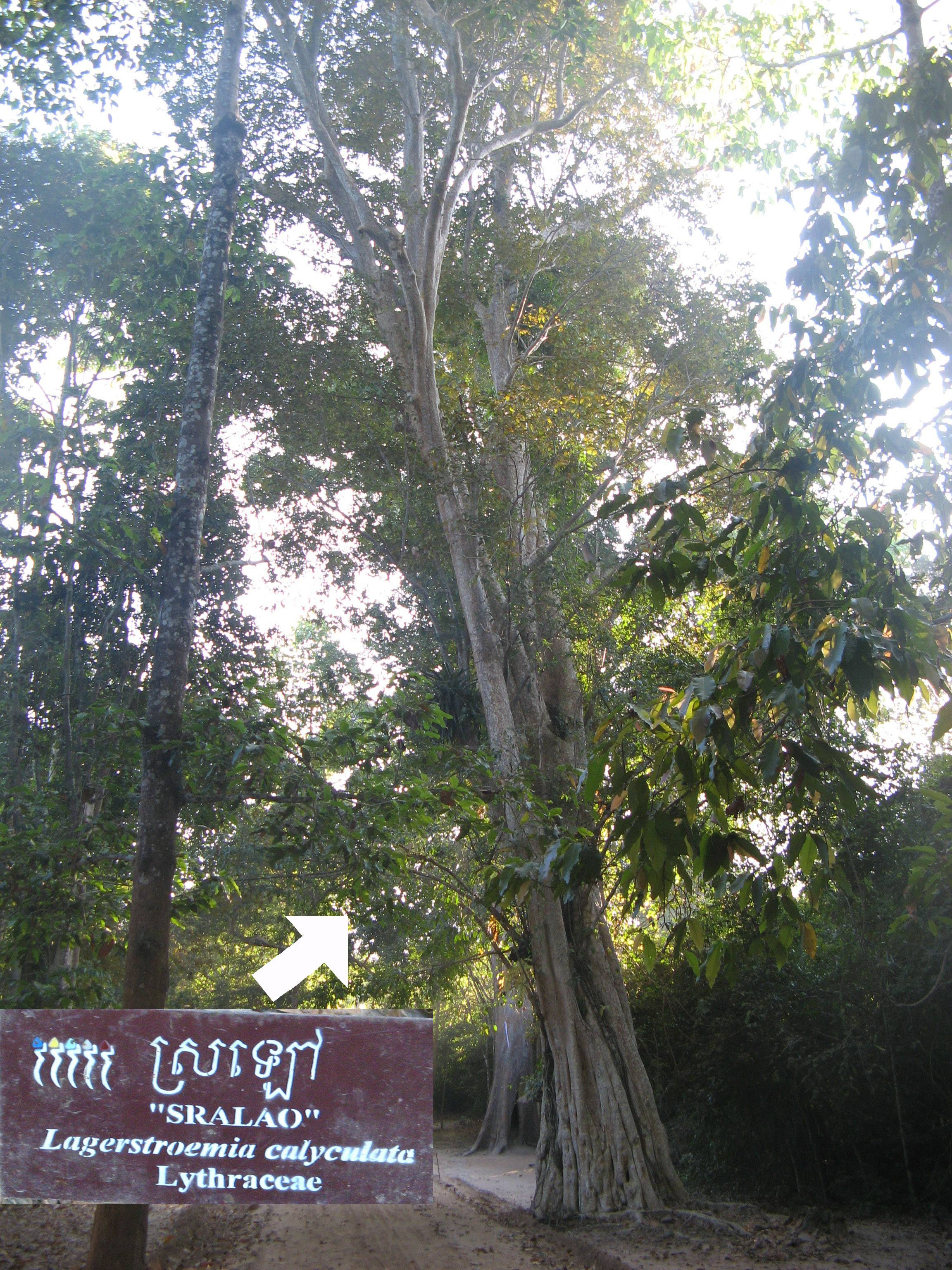 Lagerstroemia calyculata. ("Sralao")